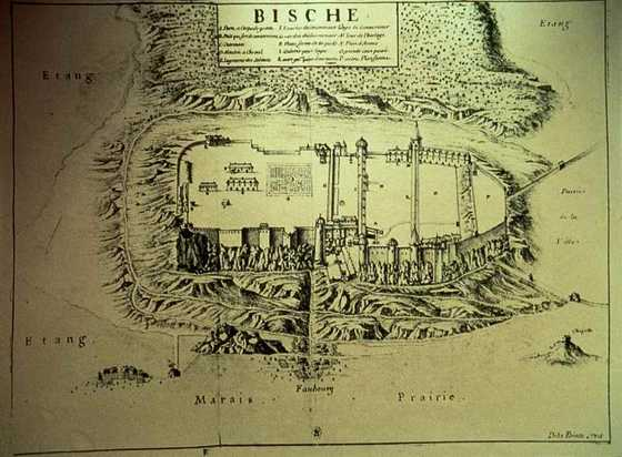 Die Zitadelle von Bitch umgeben von Feuchtgebieten; Teichen und Sumpf